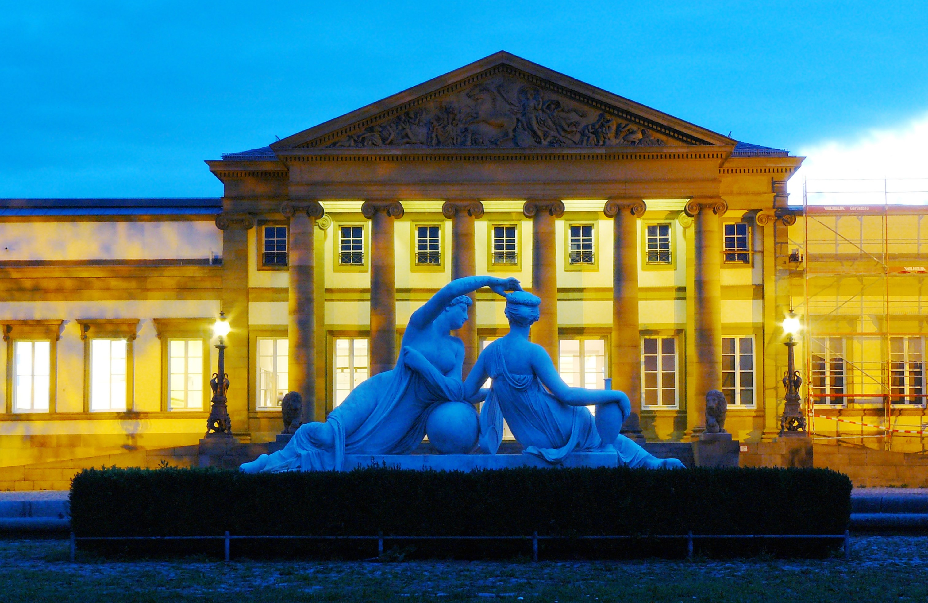 Schloss Rosenstein mit Nymphengruppen zur blauen Stunde